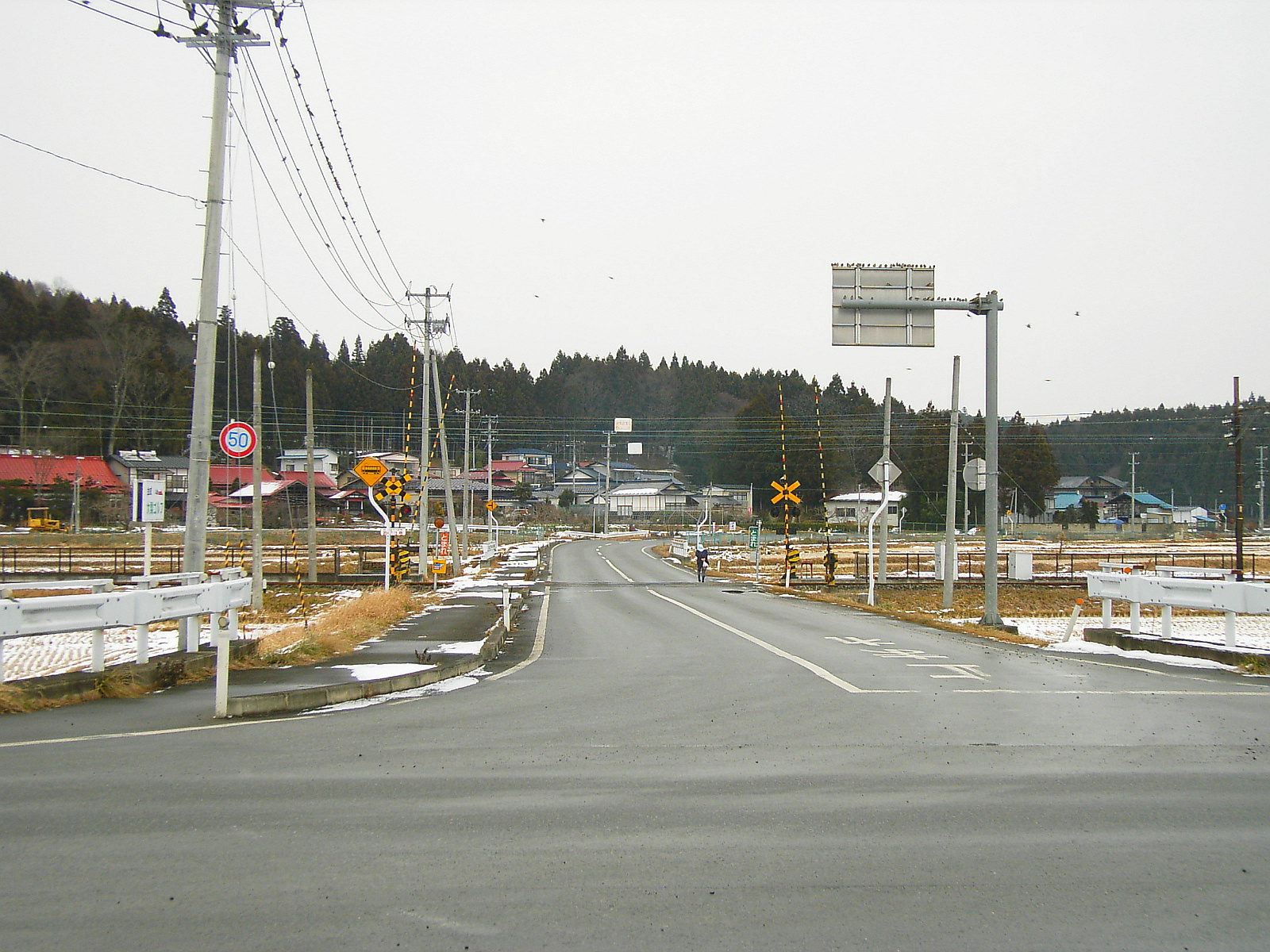 Miyagi Prefectural Road 186, Aburashima-Kurikoma Line. Kurihara, Miaygi prefecture, Japan.